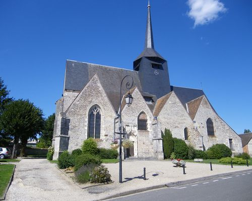 L'église de Clémont